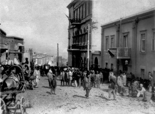 Beginning of Nizami street in Baku, 1913.